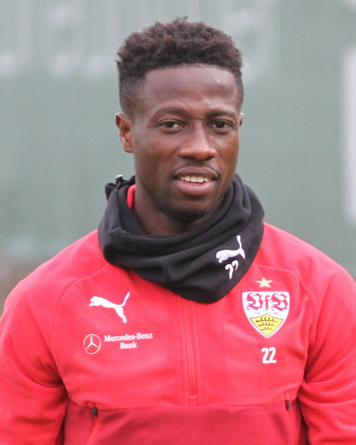 Ebenezer Ofori beim VfB-Training. Aufgenommen von